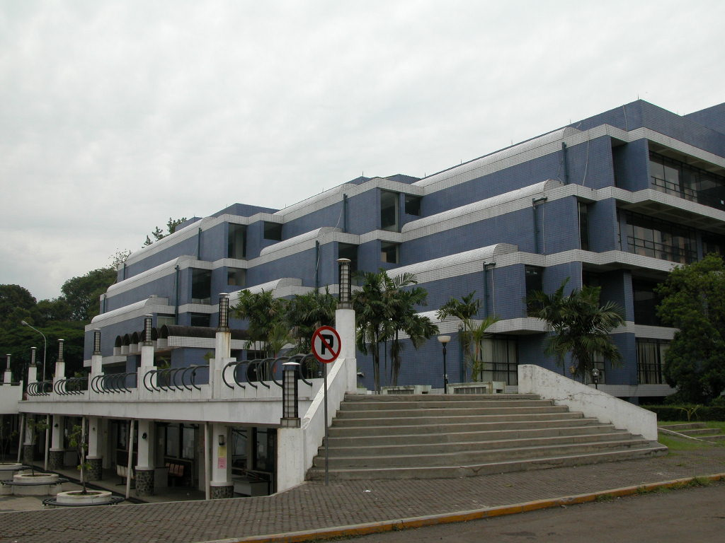 Gedung perpustakaan pusat Institut Teknologi Bandung